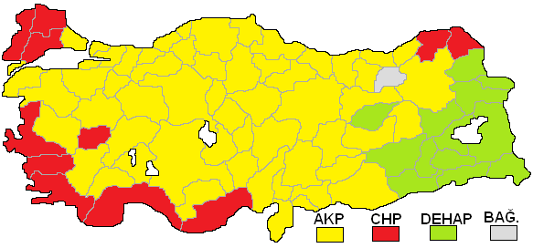 2002 genel seçimleri sonucunun Türkiye iller haritasında gösterimi.